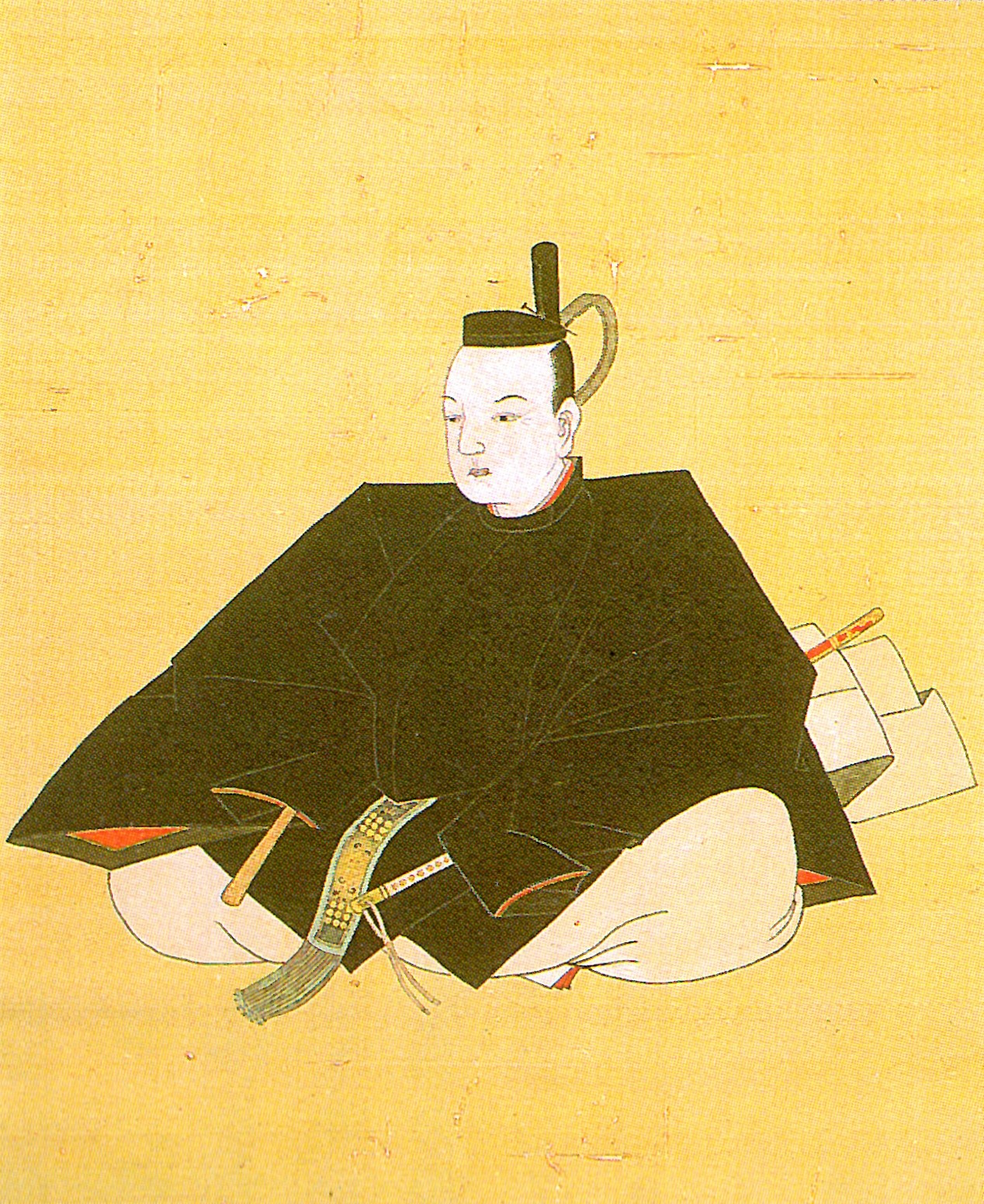 保科正経の肖像。